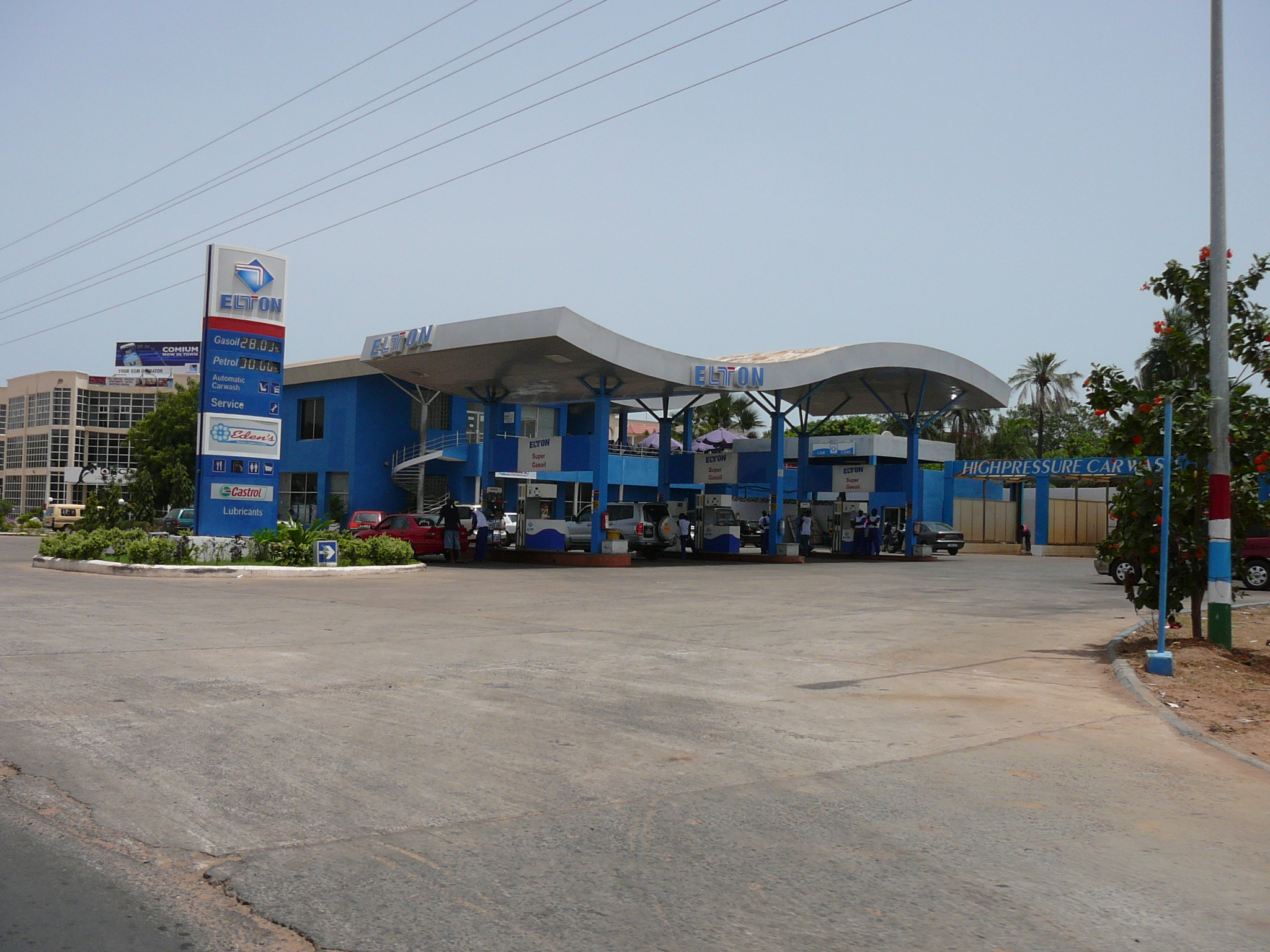 Straße in Gambia, nähe Kotu, Tankstelle: Elton Oil Company